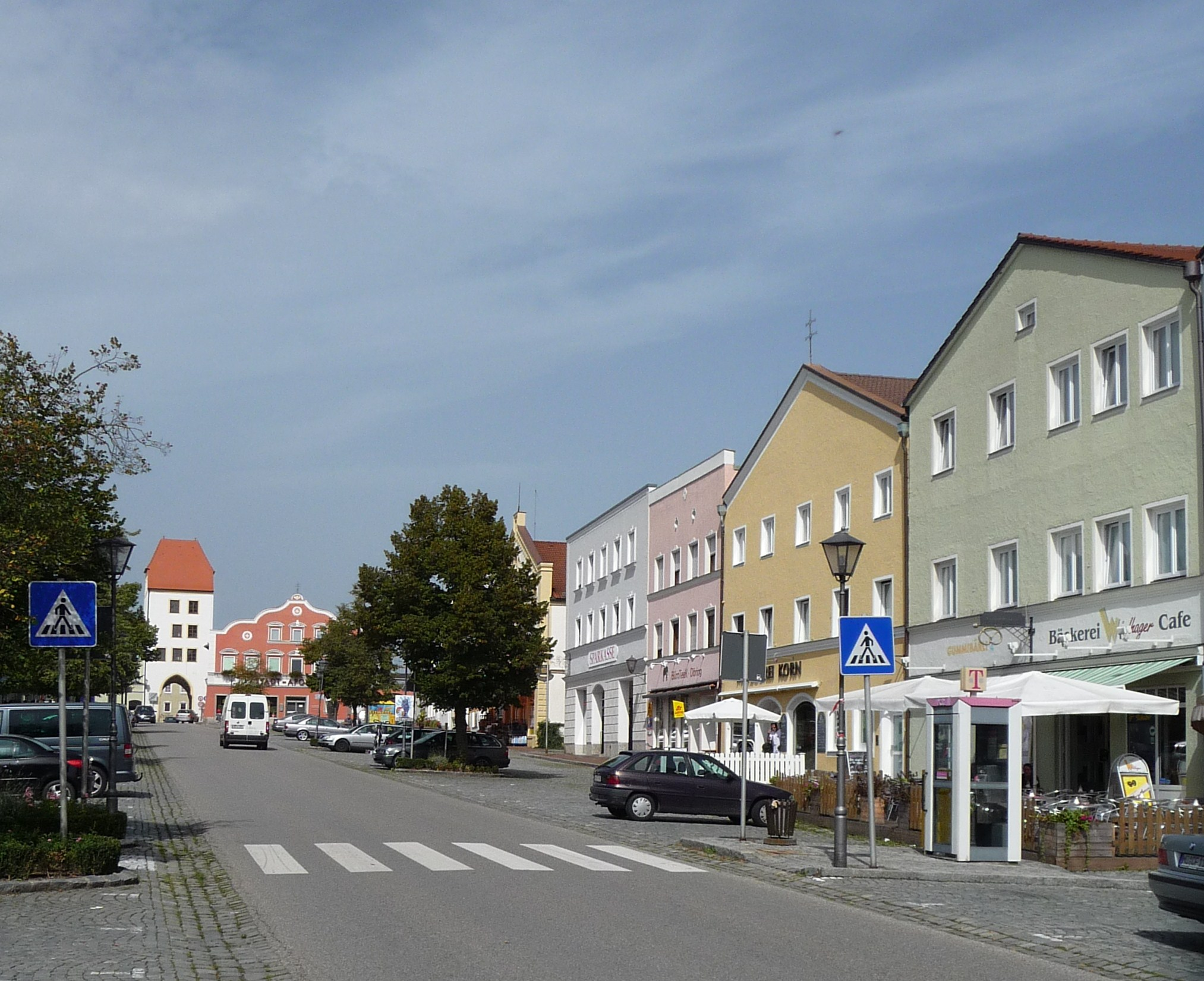 Der Marktplatz (Stadtplatz) von Neumarkt-Sankt Veit